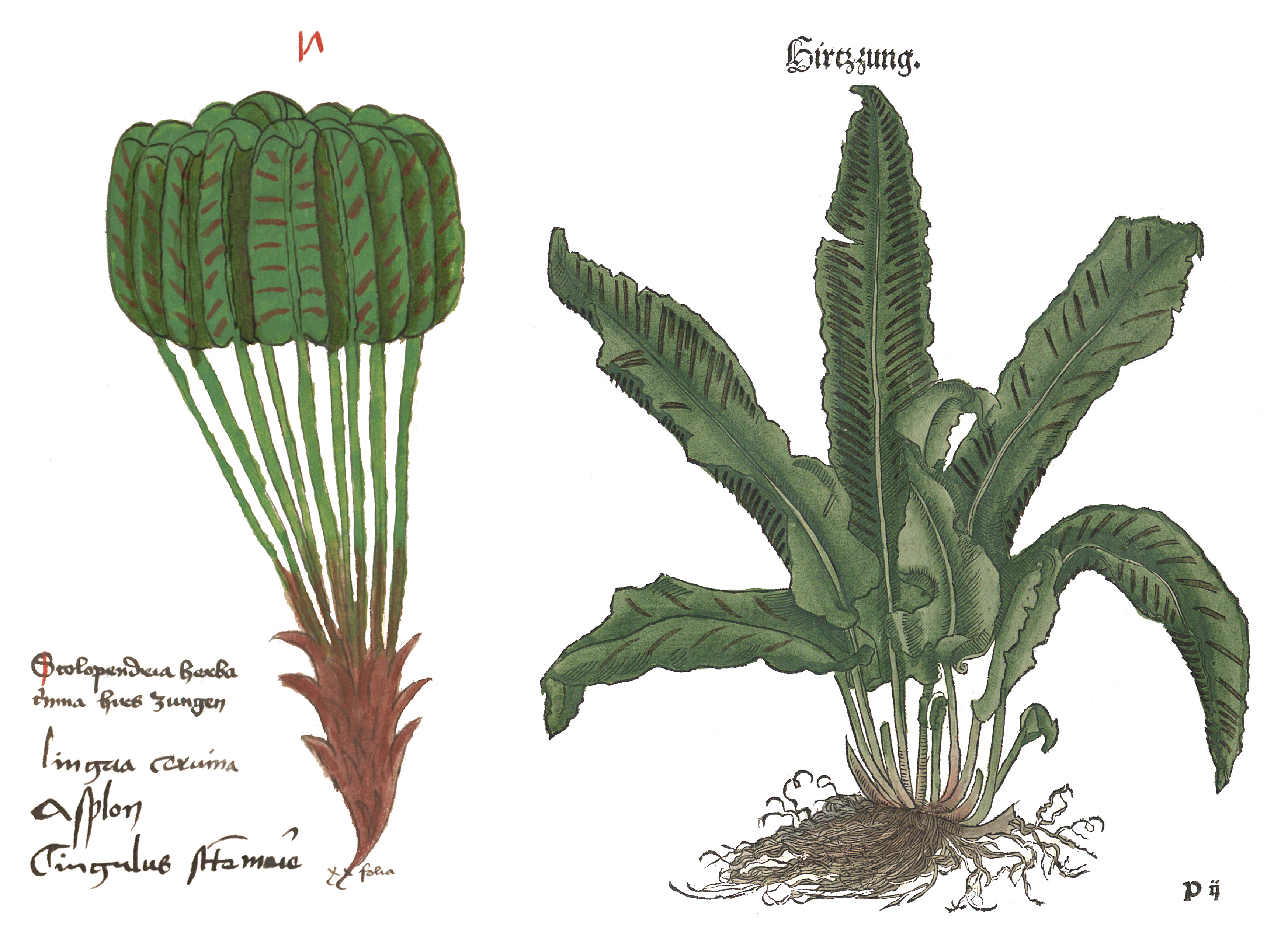 Abbildung von Asplenium scolopendrium